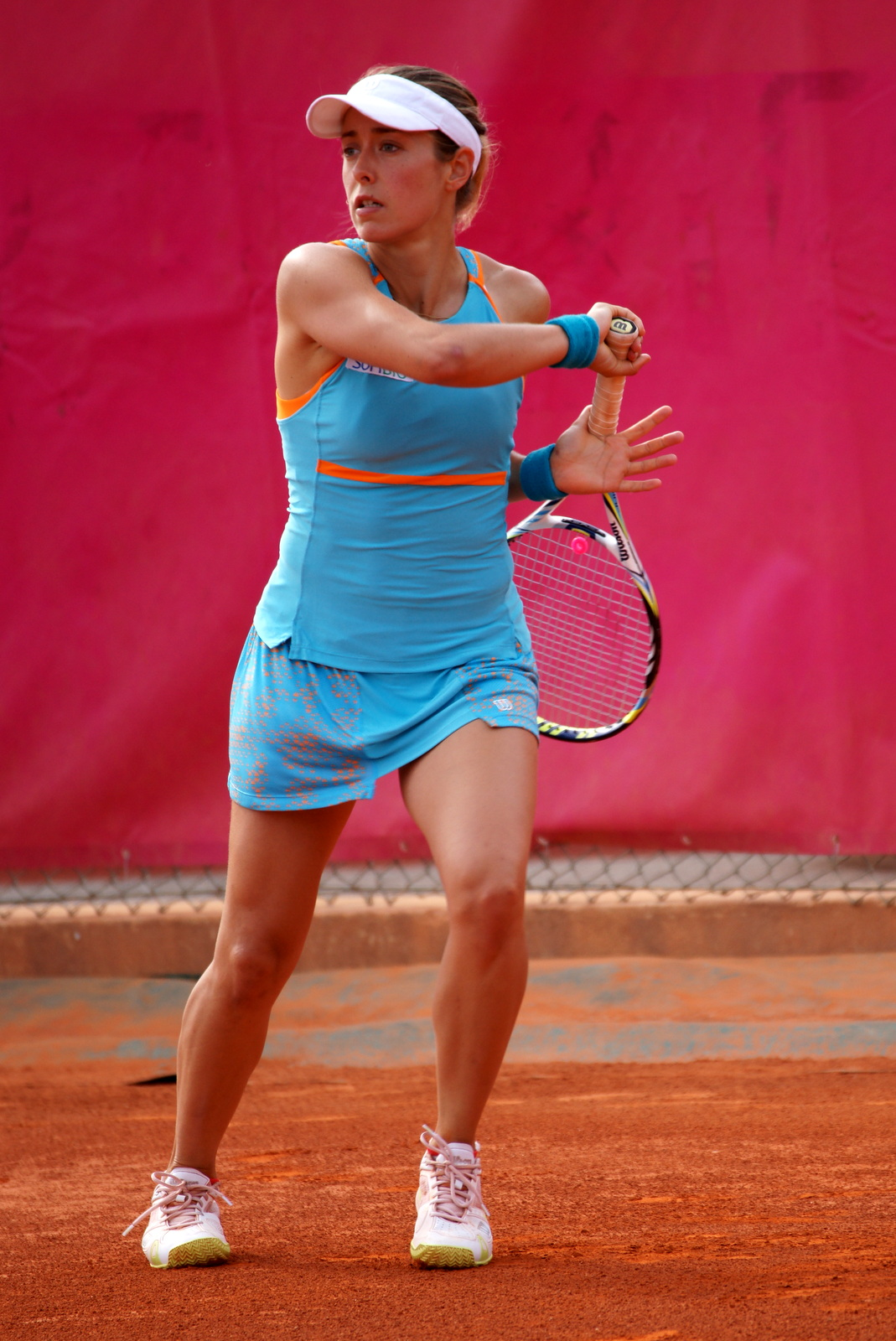 Victoria Larrière au tournoi ITF de Cagnes-sur-Mer 2013